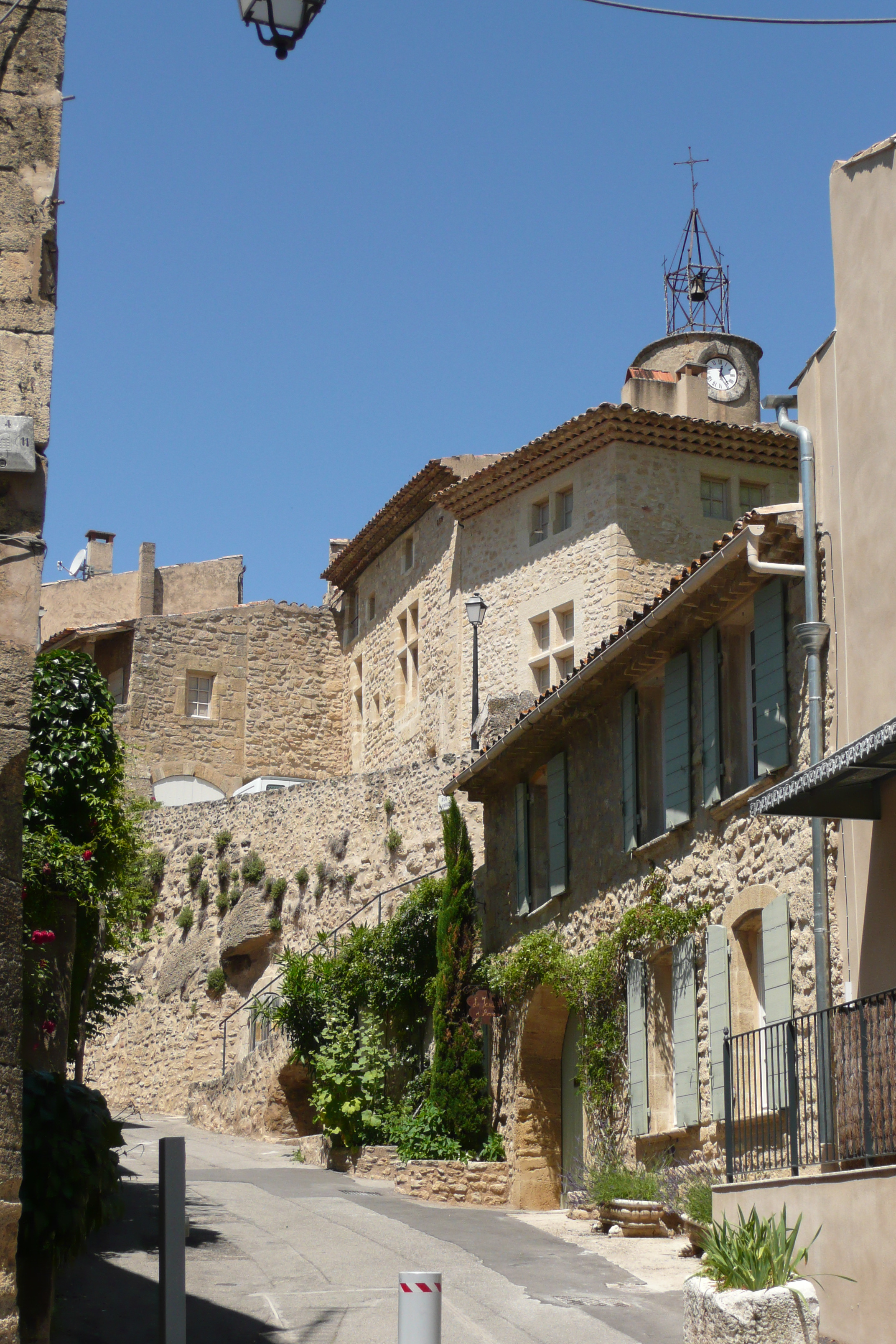 Ansouis